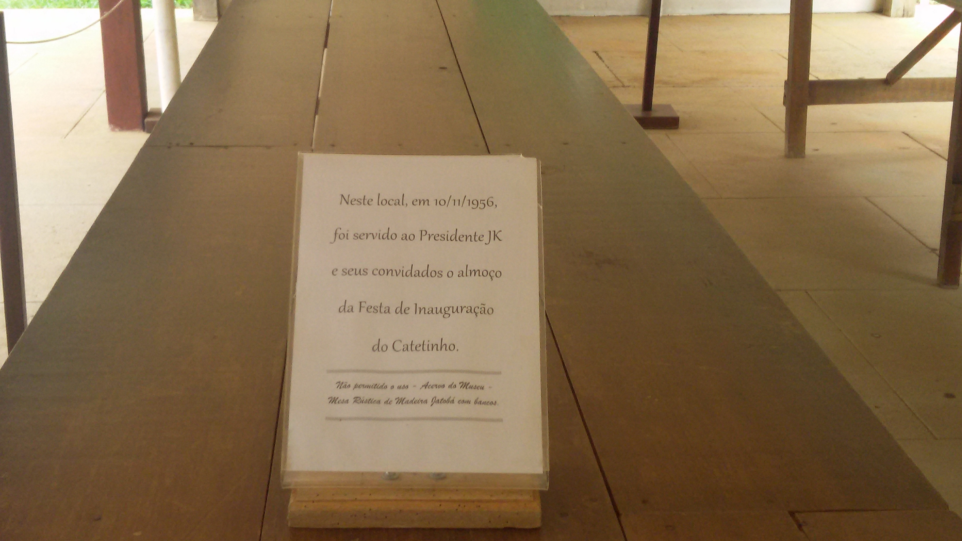 hay una pequeña placa hablnado sobre la inauguración.